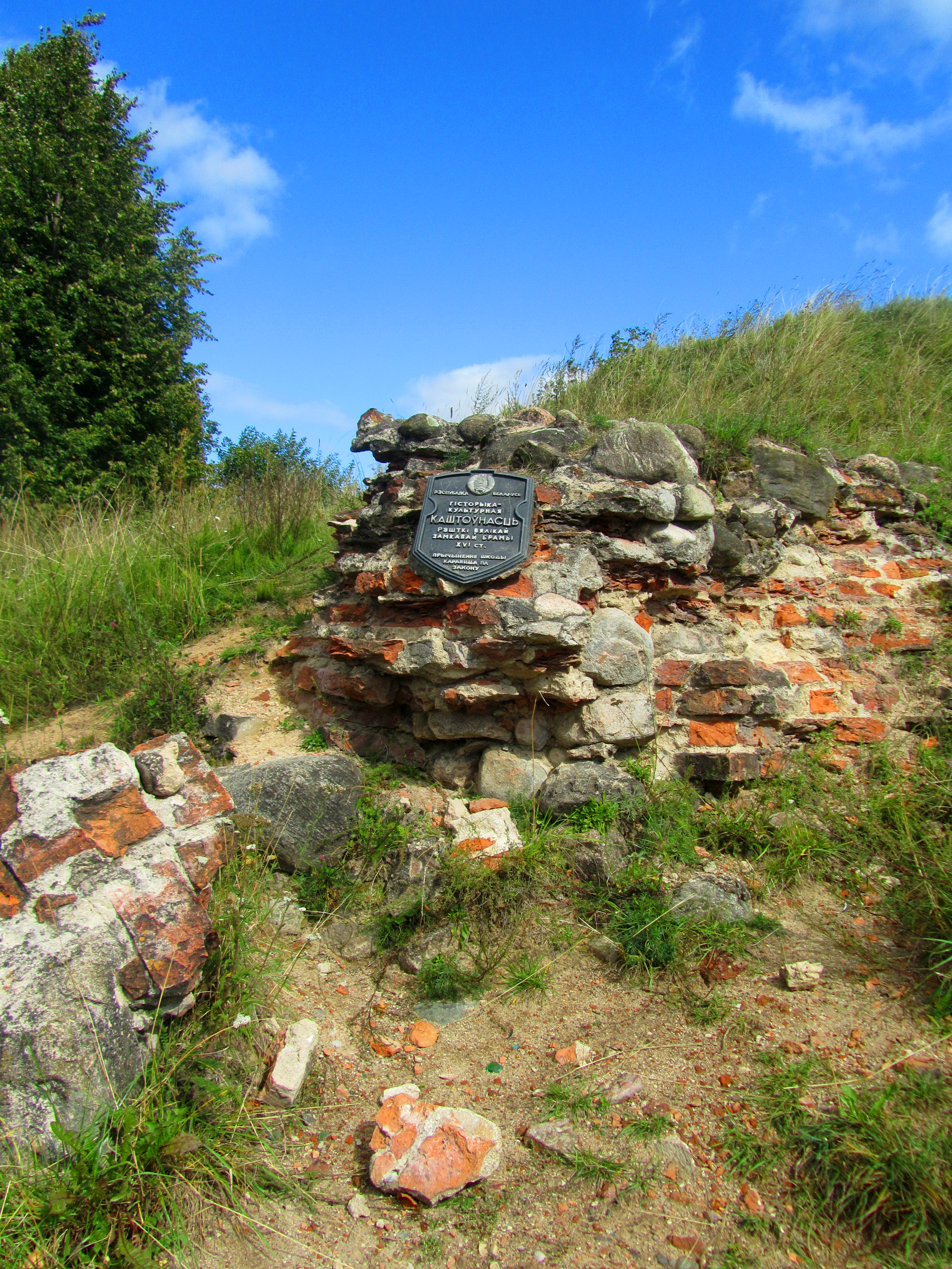 Беларуская (тарашкевіца): Гарадзішча «Вал». г. Заслаўе This is a photo of Belarusian heritage monument. Reference number: 613В000336 ( WLM)